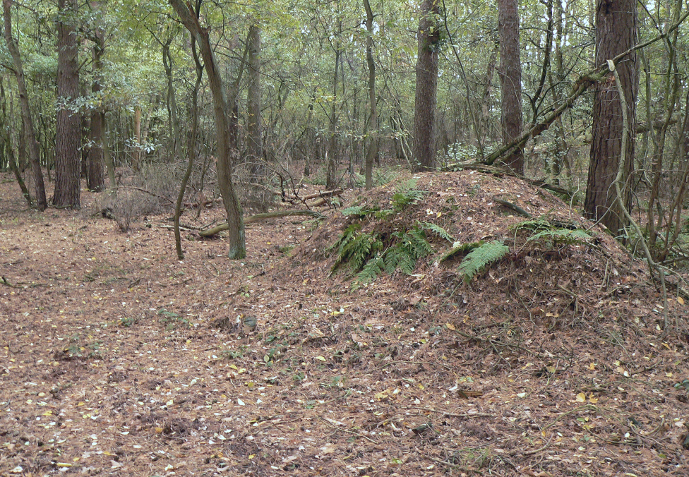 Gräberfeld Liebenau, früheres Ausgrabungsgelände mit Erdhügeln vermutlich von den Grabungen